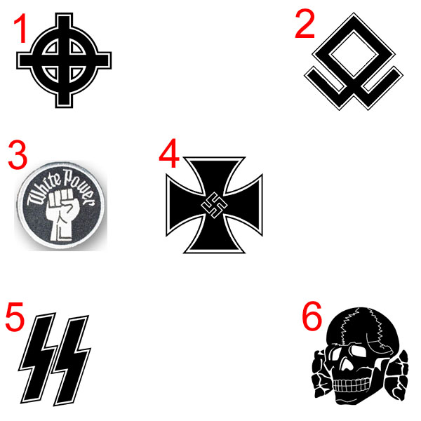 Un simple montage le seul endroit il elle se trouve sur internet c'est sur mon skyblog destiner à la culture skinhead.